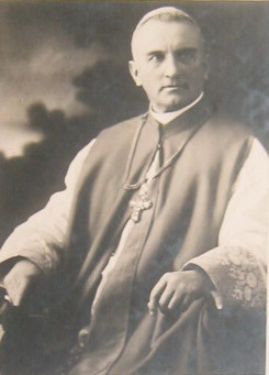 Mons. ThDr. Jan Stavěl (1869 - 1938), Moravský římskokatolický duchovní .